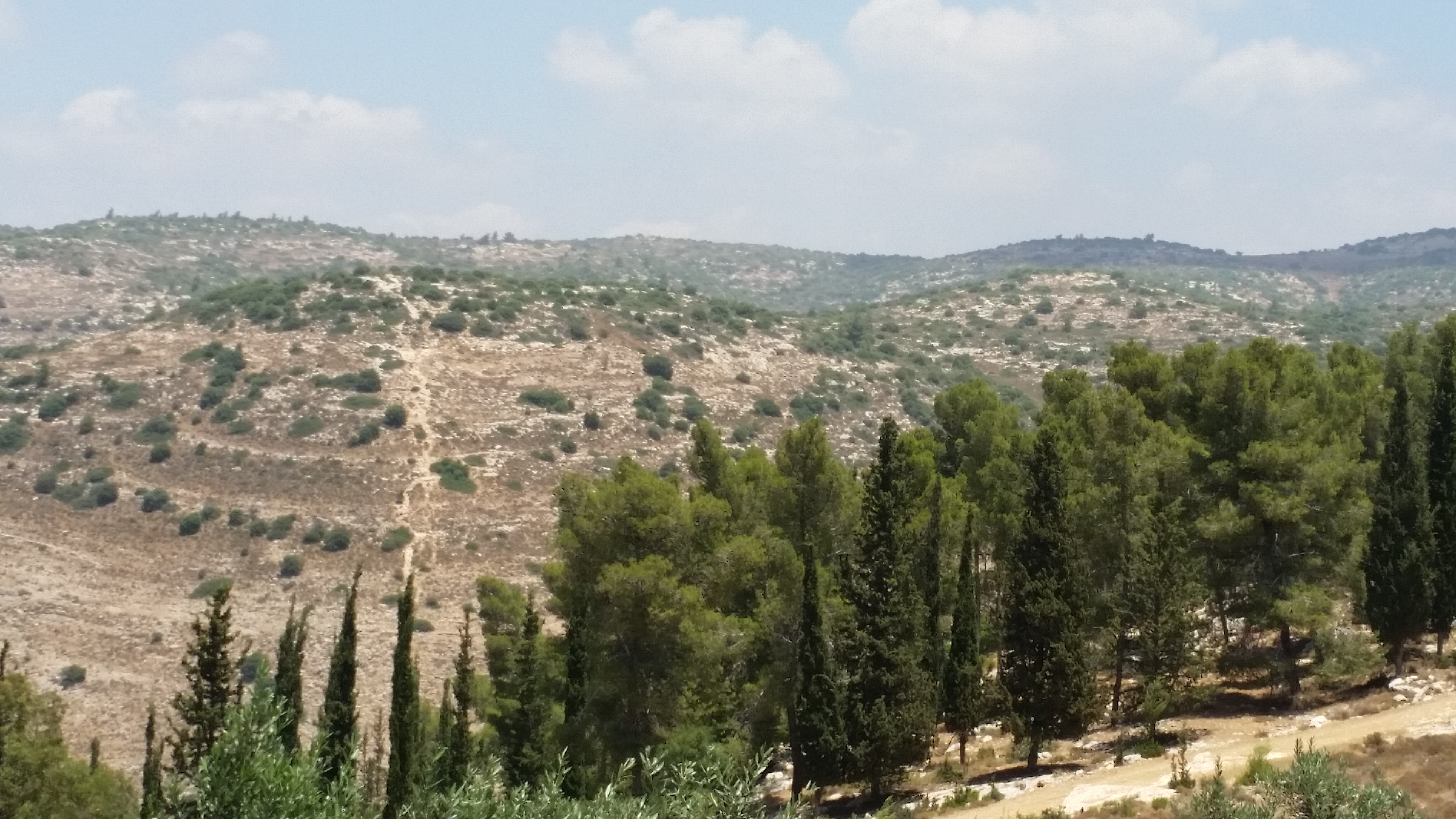 הגבעה שמשמאל, שאליה עולה השביל, היא גבעת הקרב שעליה נלחמו הל"ה את הקרב האחרון. מימין גבעה 603, שנתפסה על ידי הערבים